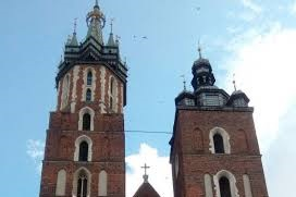 маріацький костал